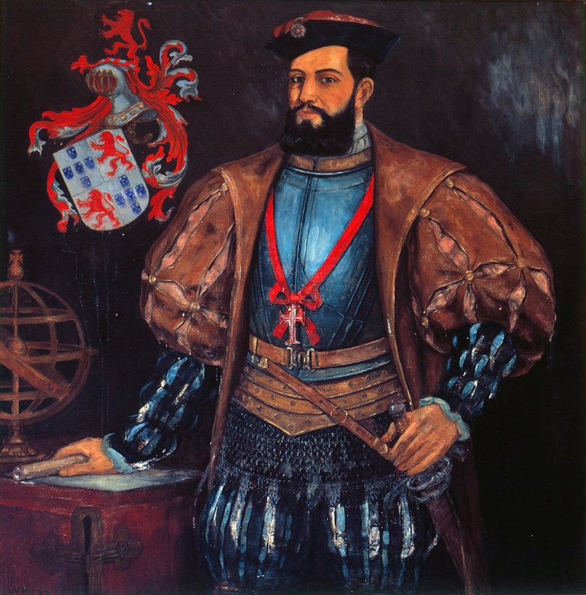 A obra foi produzida com tinta a óleo. Suas medidas são: 142 centímetros de altura e 142 centímetros de largura. Faz parte da Coleção José Wasth Rodrigues, no Museu Paulista, especialmente voltada à reconstrução da formação cultural de São Paulo. A obra foi uma encomenda de Afonso d'Escragnolle Taunay, no contexto do programa decorativo do Museu Paulista, na primeira metade do século XX. O quadro foi colocado no saguão principal do museu.